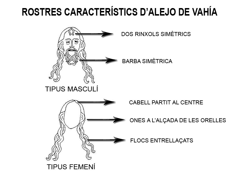 Característiques pròpies de l'escultor gòtic Alejo de Vahía